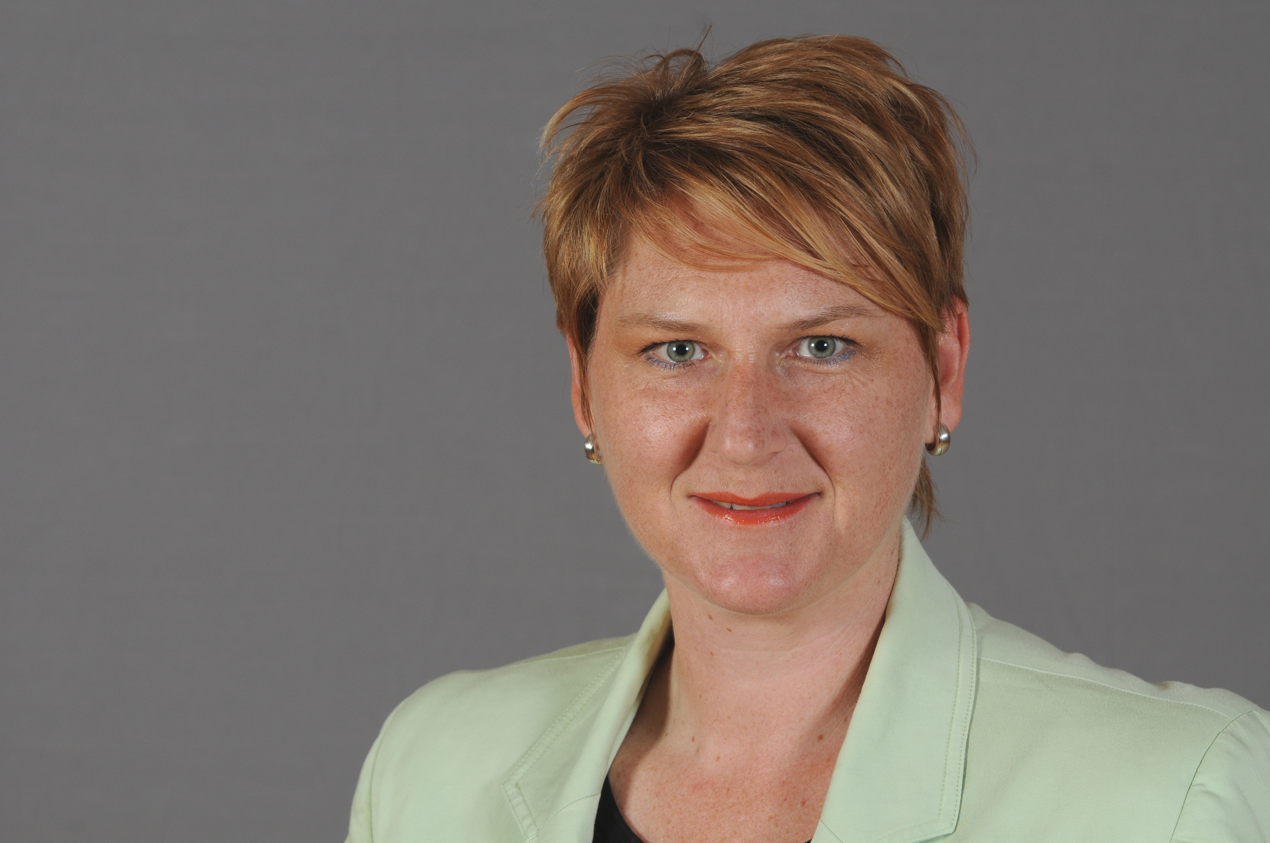 Helga Krismer-Huber. Abgeordnete zum Landtag von Niederösterreich.